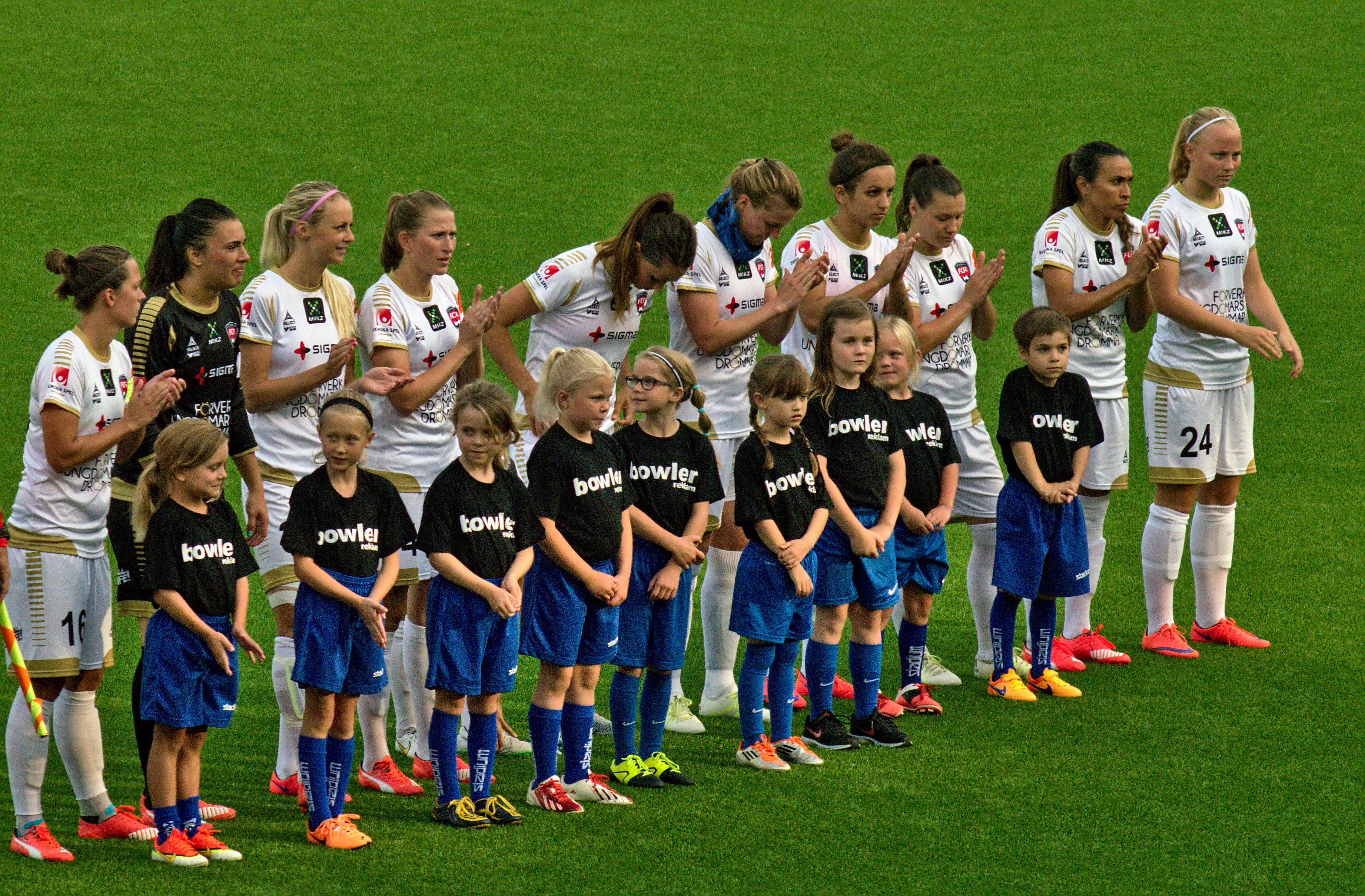 Eskilstuna United - FC Rosengård, Tunavallen i Eskilstuna 5 augusti 2015. Startelvor.